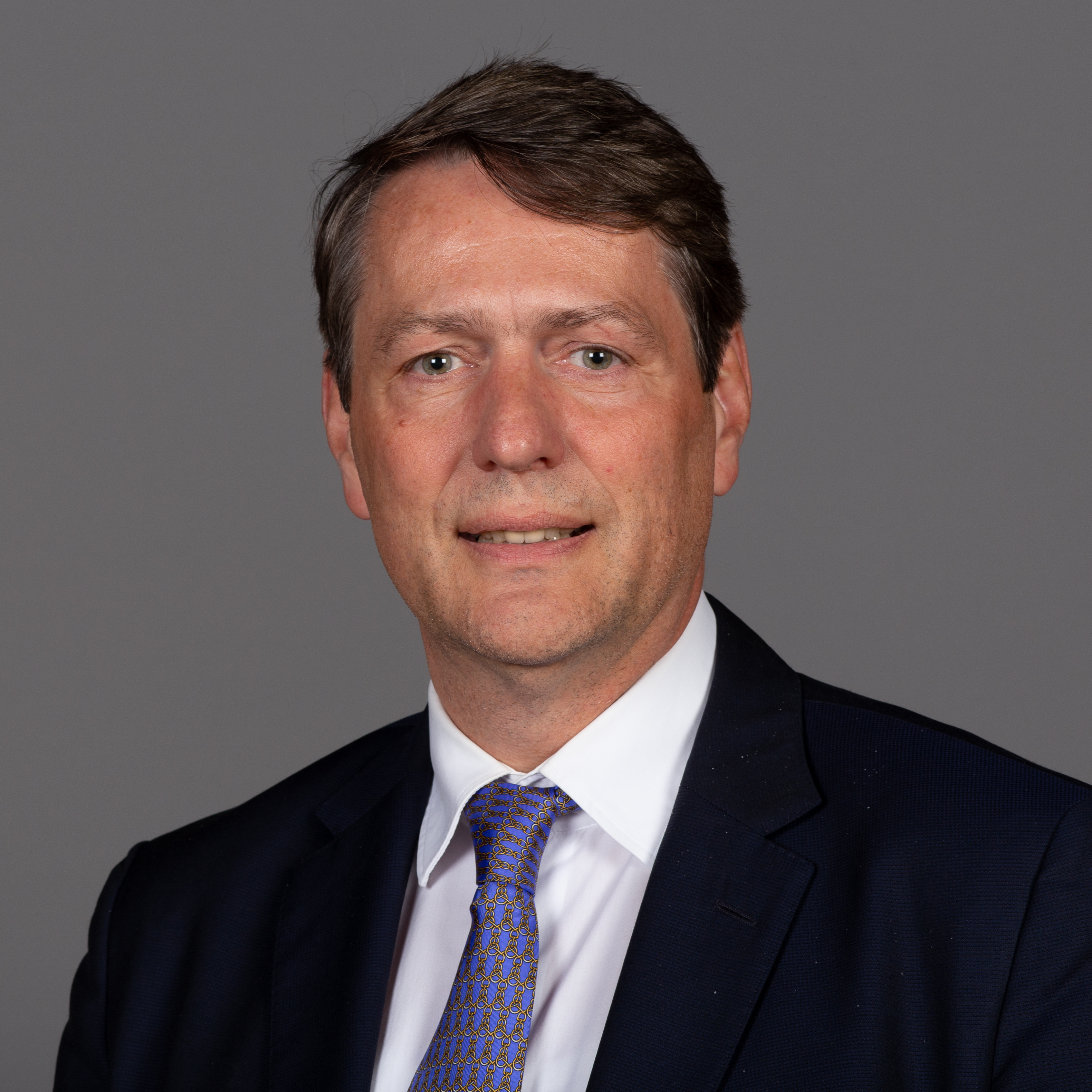 Abgeordnete(r) der Bürgerschaft der Freien und Hansestadt Hamburg Dietrich Wersich